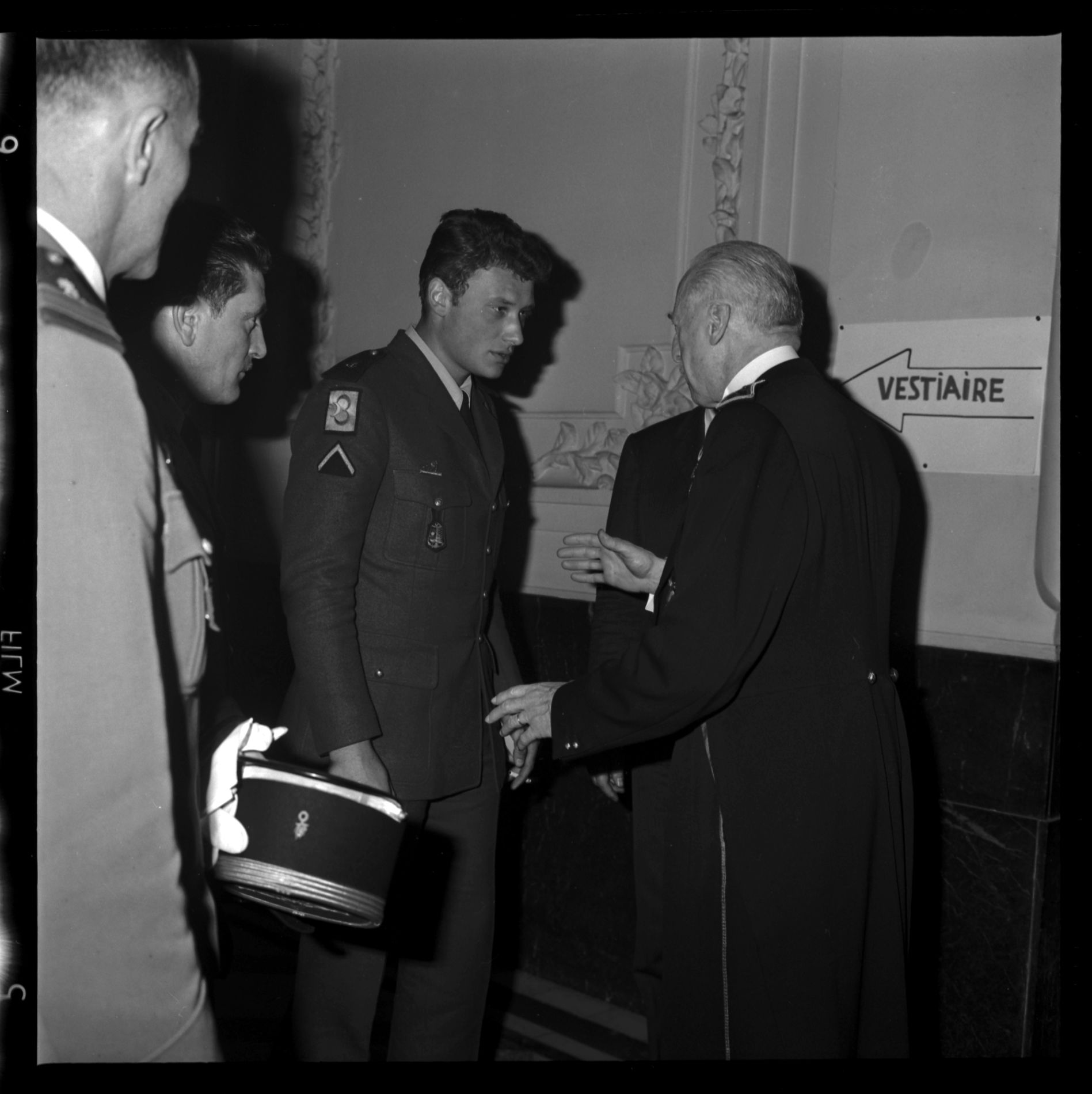 Théâtre du Capitole ? 2 juin 1965. Vue de Johnny Hallyday en conversation avec le général Koenig.